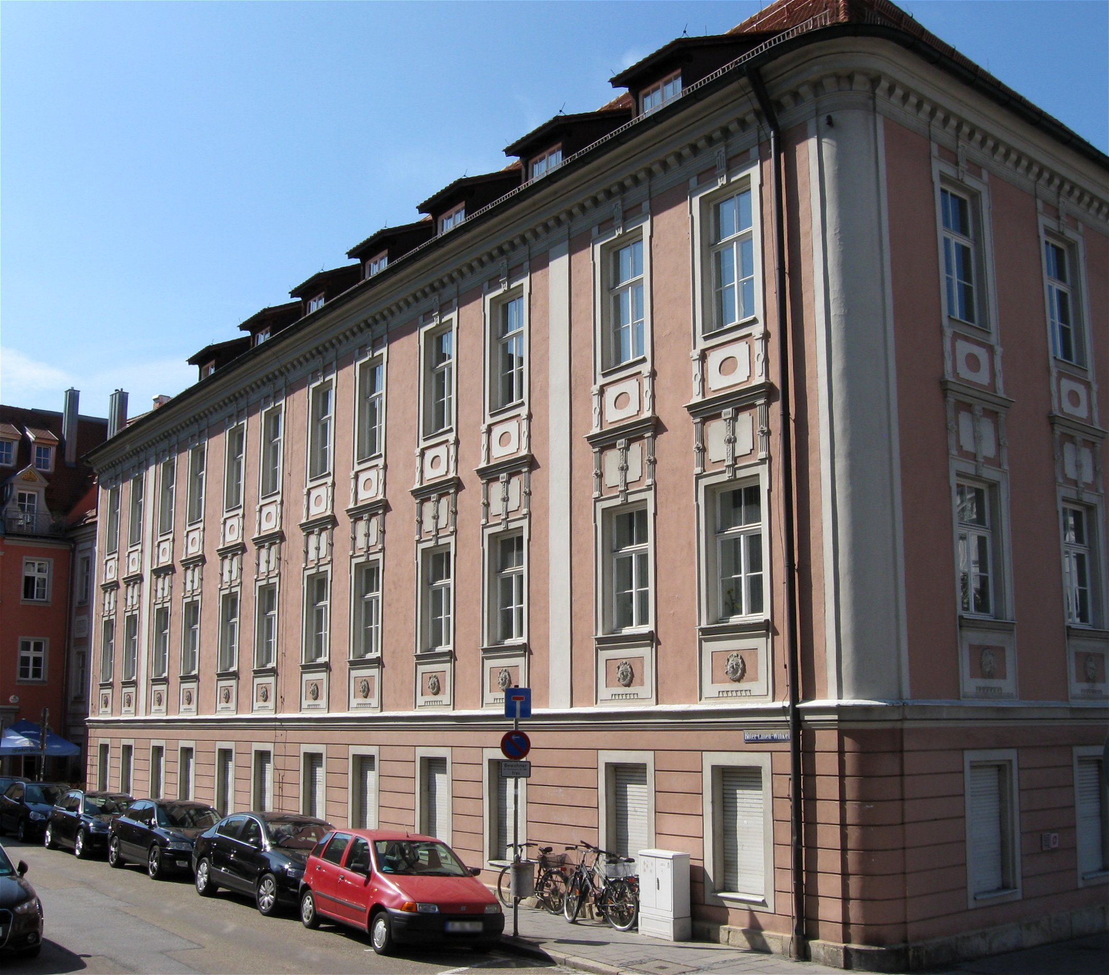 Emmeramsplatz 8; Ehem. Äußeres Palais des Klosters St. Emmeram, seit 1812 Sitz der Regierung der Oberpfalz dreigeschossige Vierflügelanlage mit Walmdach, Fassadengliederung mit Fensterbändern und Lisenen, Werkstein und Putz, Säulenportal mit Ädikula, 2. Hälfte 17. Jh., klassizistischer Umbau mit Festsaal und Treppe 1792 durch Joseph Sorg